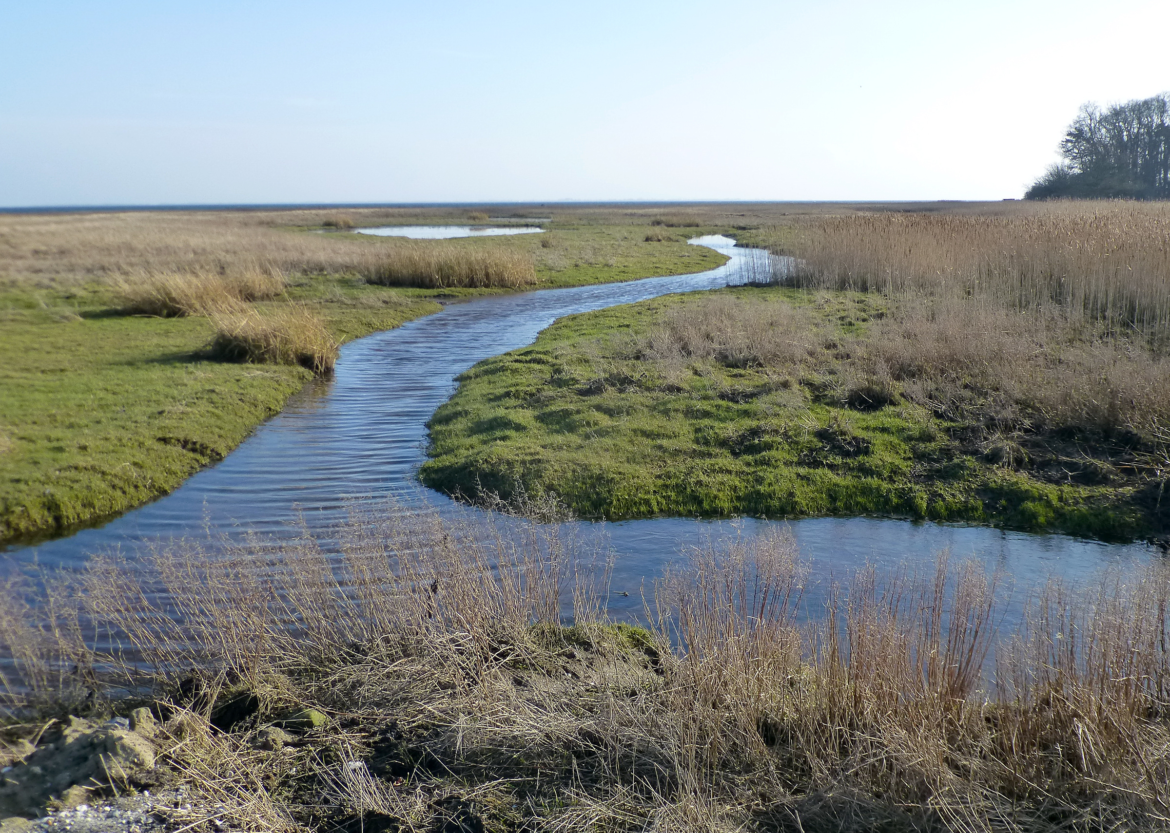 Strandenge ud for Maden Gyllingnæs